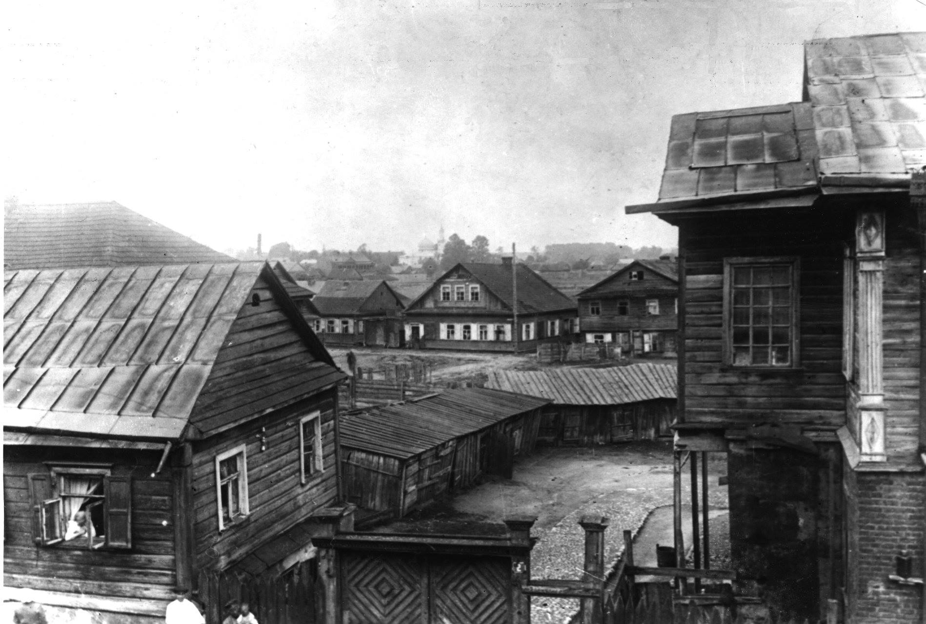 Беларуская (тарашкевіца): Менск (Miensk), Замчышча (Zamčyšča). Удалечыні відаць Татарскую Слабаду і мячэт